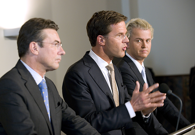 30/09/10: Fractievoorzitters Mark Rutte (VVD), Maxime Verhagen (CDA) en Geert Wilders (PVV) presenteren het regeer- en gedoogakkoord.